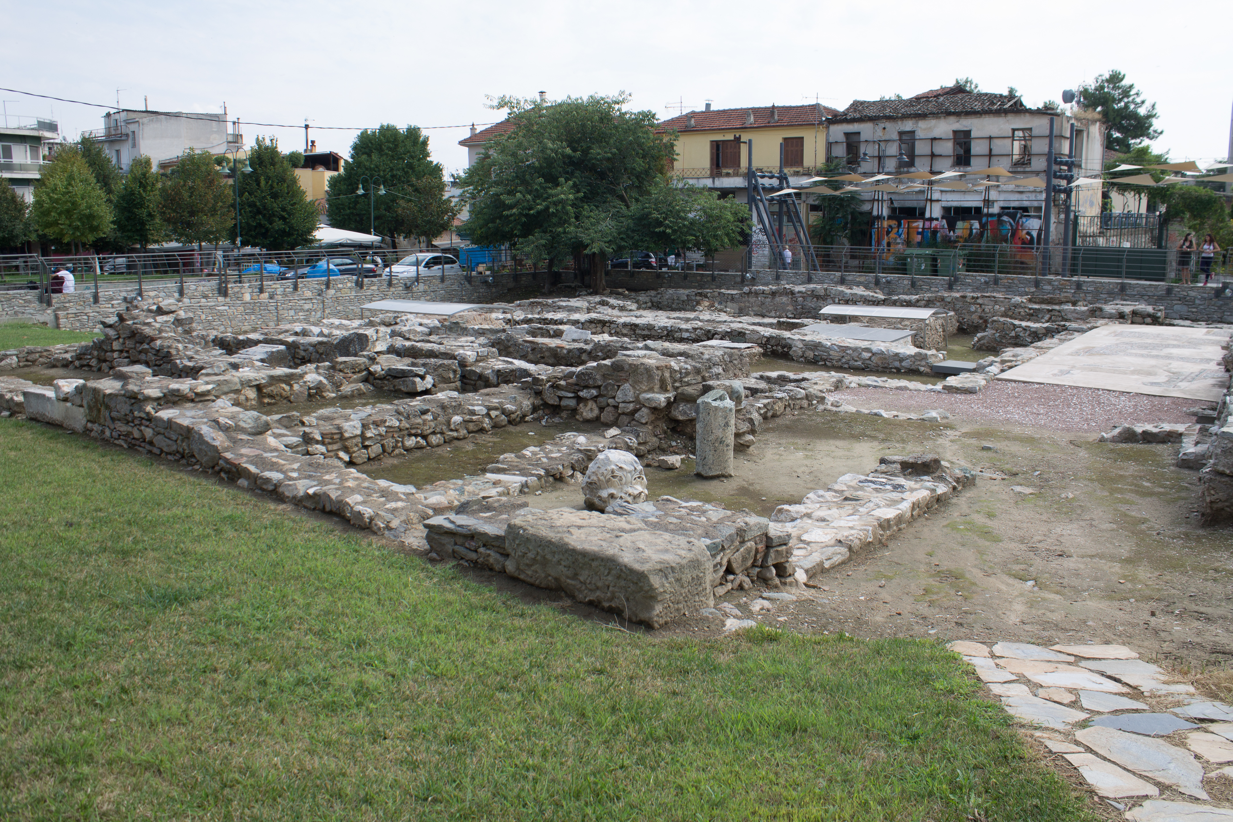 Ερείπια παλαιοχριστιανική βασιλικής Αγίου Αχιλλείου από την βορειοδυτική γωνία«Αρχαιολογικός χώρος Φρουρίου Λάρισας»